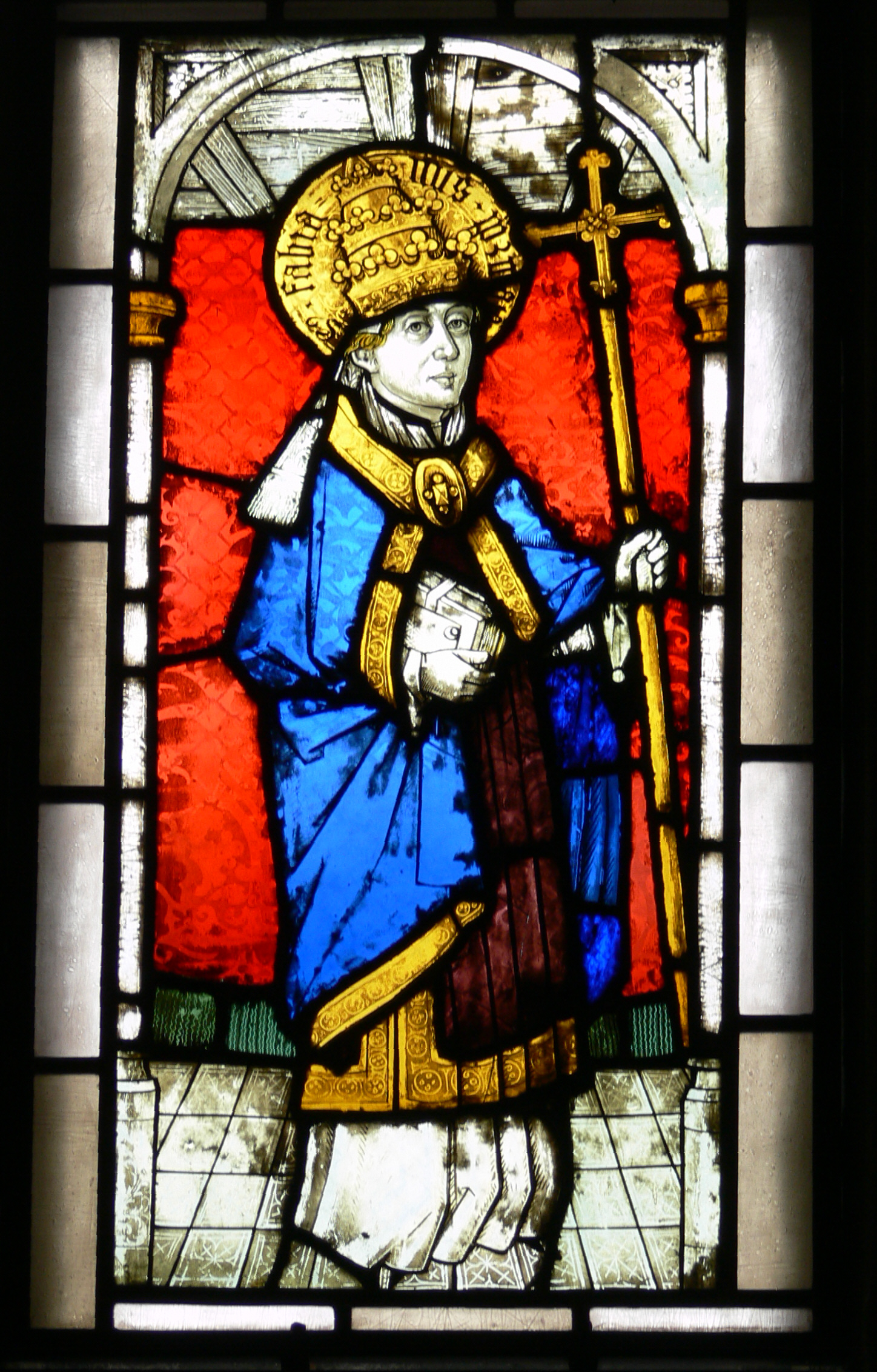 Evangelische Stadtkirche Ravensburg (ehem. Karmeliterkirche) Kapelle der Ravensburger Handelsgesellschaft (Gesellschaftskapelle) Fenster des 15. Jahrhunderts: Hl. Papst Fabianus